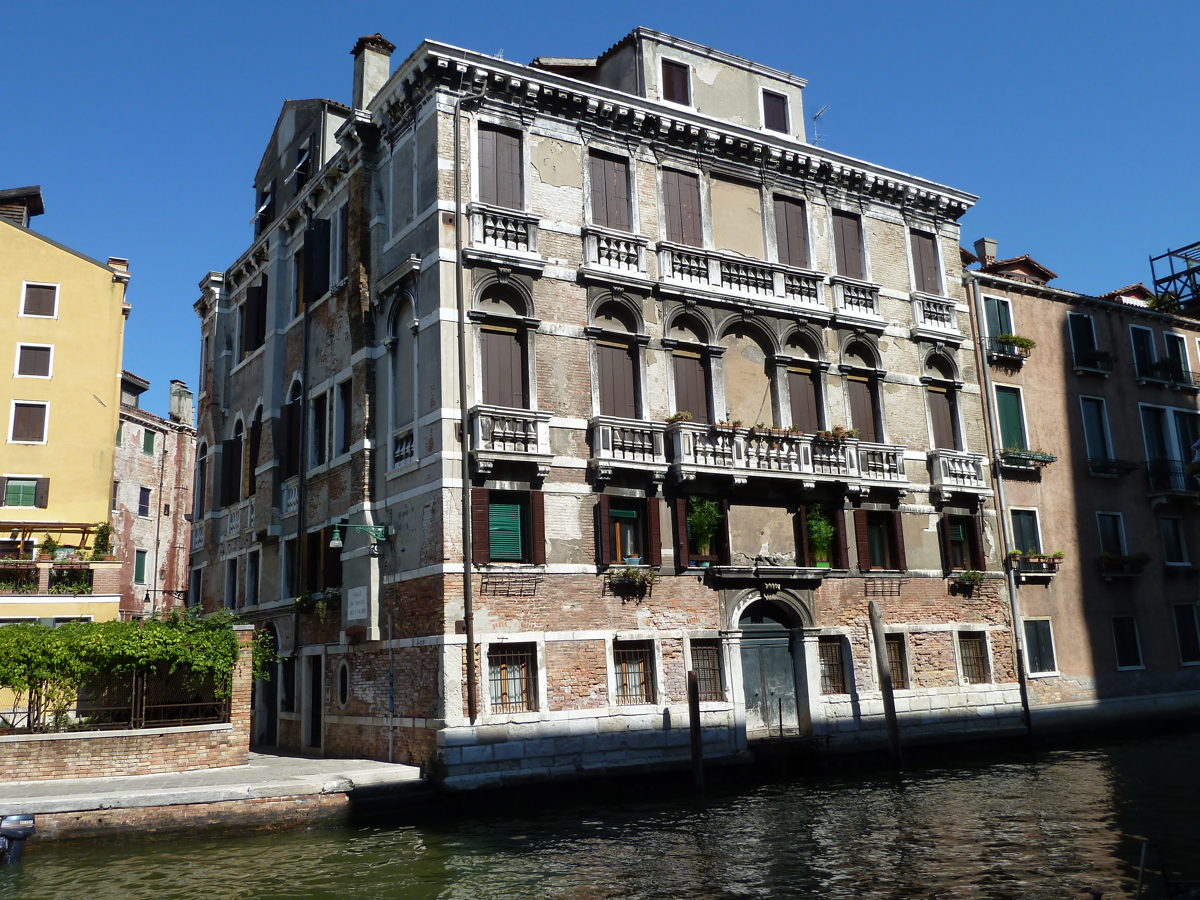 Ca' da Mosto